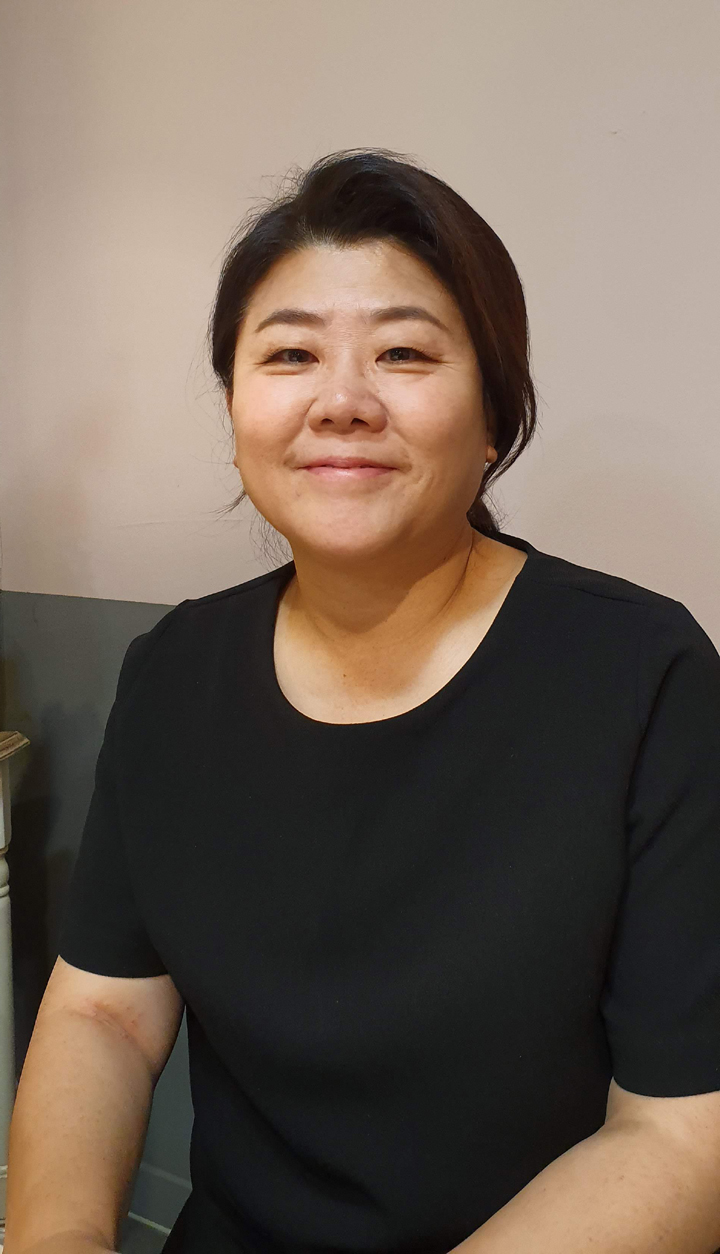 한국여배우 이정은 2019년